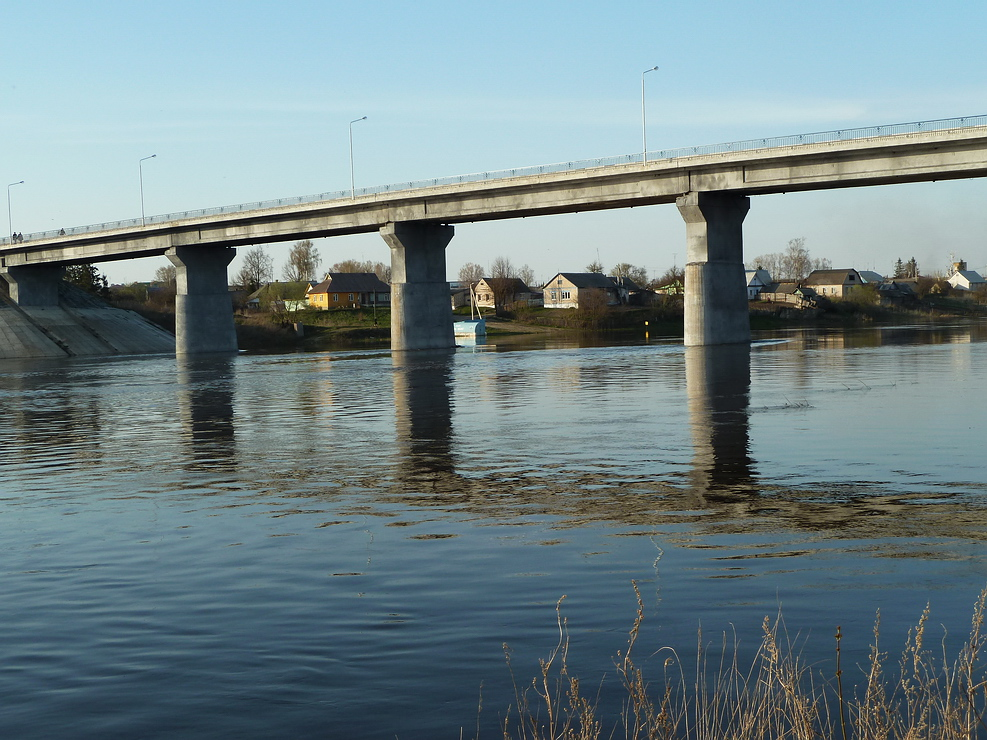 Автомобильный мост